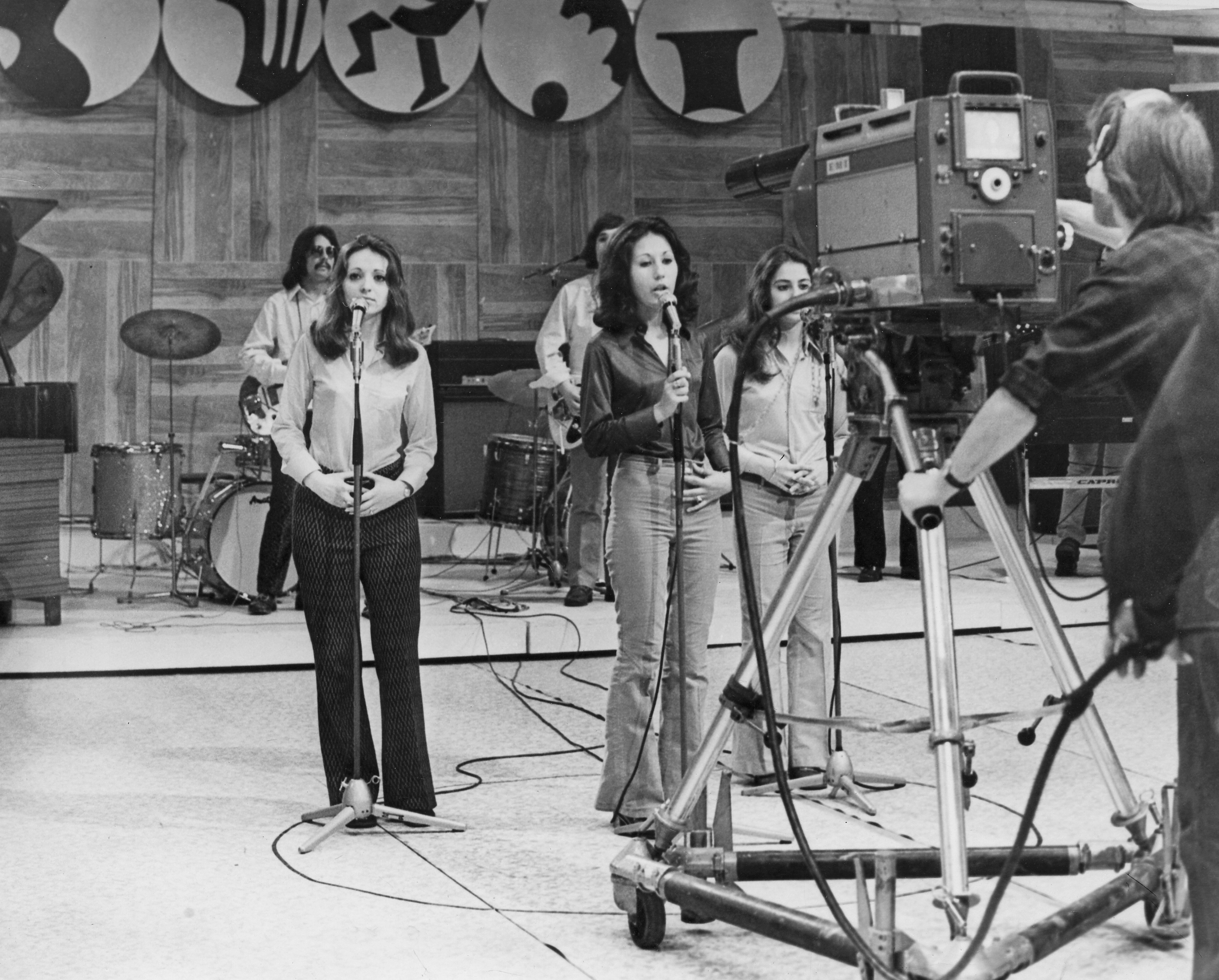 Ki mit tud?, Mikrolied együttes, Herczku Annamária, Selényi Hédi és Várszegi Éva. Location: Hungary Tags: Hungarian TV, singing, band, television camera Title: Ki mit tud?, Mikrolied együttes, Herczku Annamária, Selényi Hédi és Várszegi Éva.